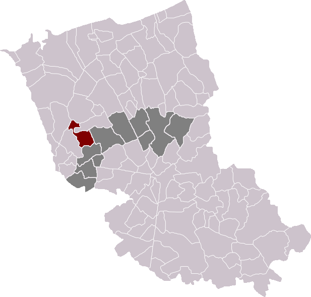 Locatie gemeente Merkegem in arrondissement Duinkerke. Zelfgemaakt. Location of Merckeghem municipality in the arrondissement of Dunkirk. Self made. Localisation de la commune de Merckeghem dans l'arrondissement de Dunkerque. Fait moi-même.